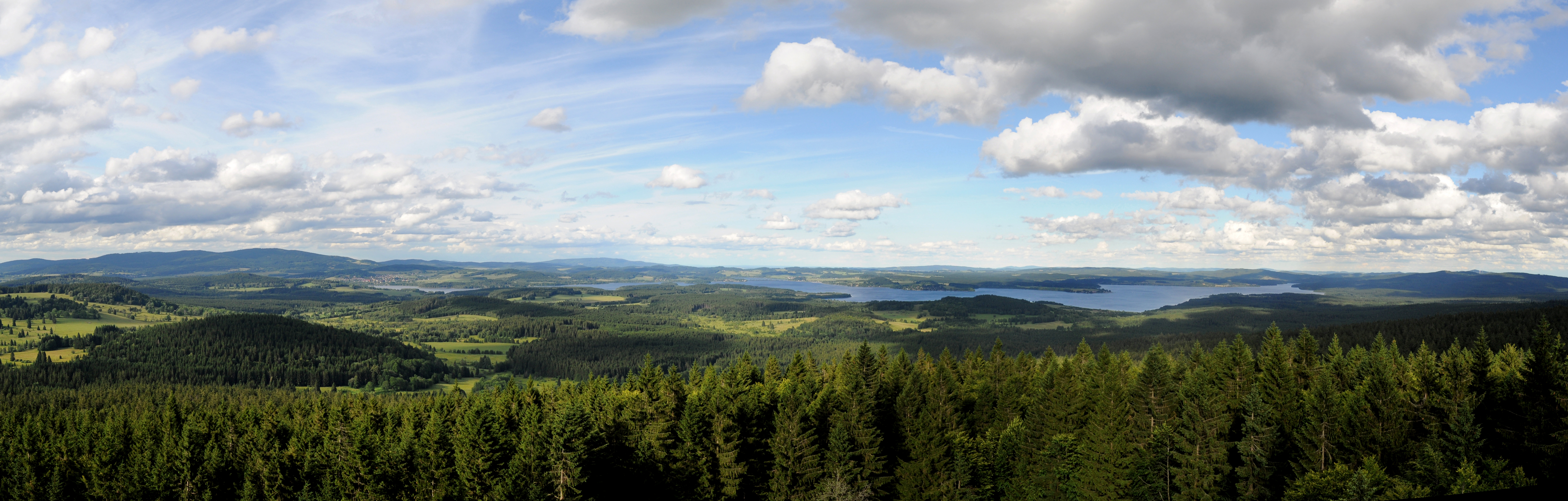 Blick vom Aussichtsturm Moldaublick auf den Moldaustausee